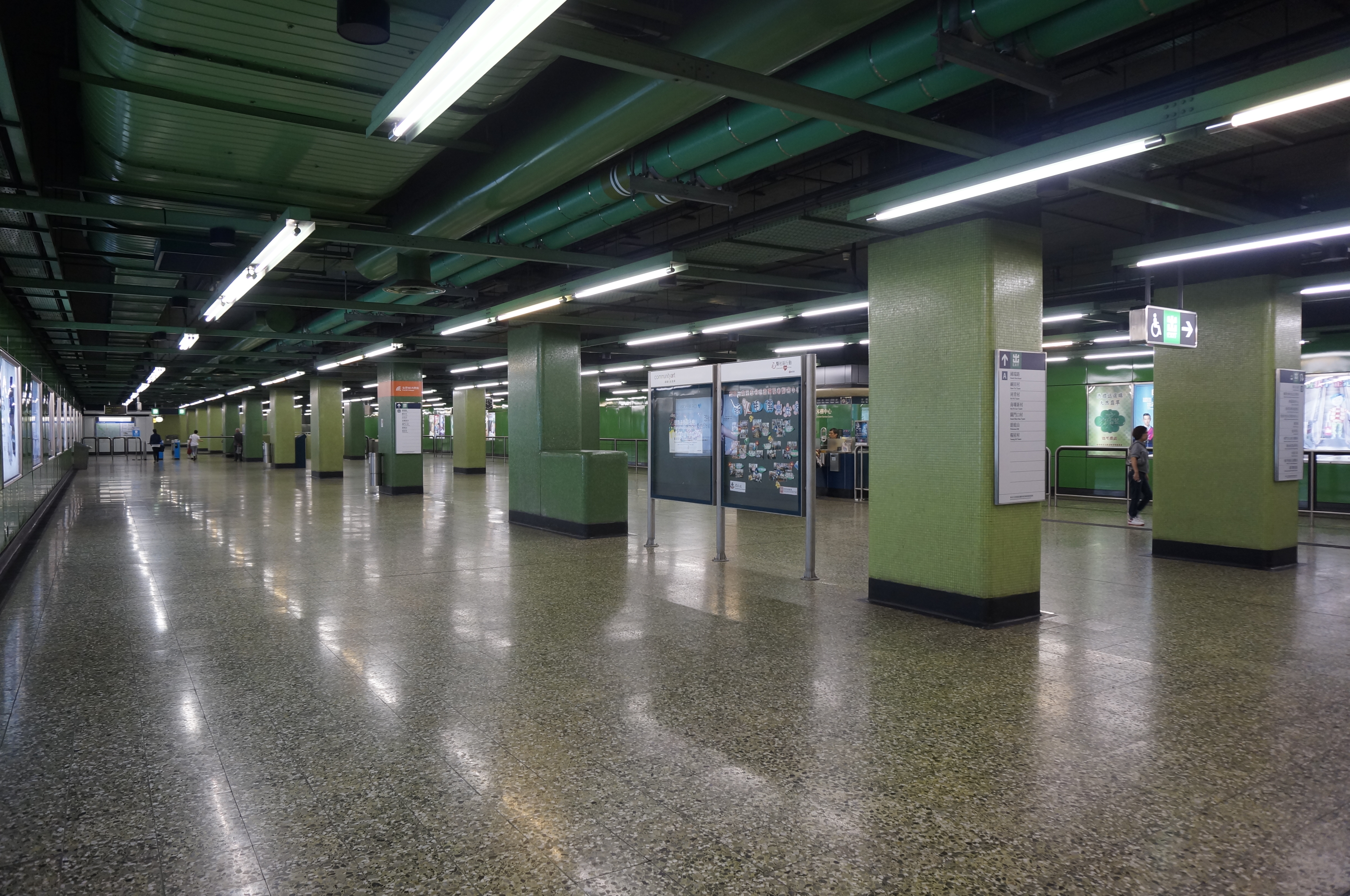 港鐵大窩口站大堂